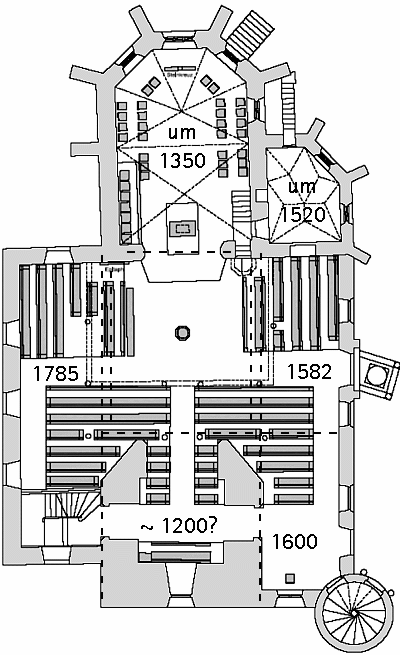 Hemmingen, Laurentiuskirche, Grundriss